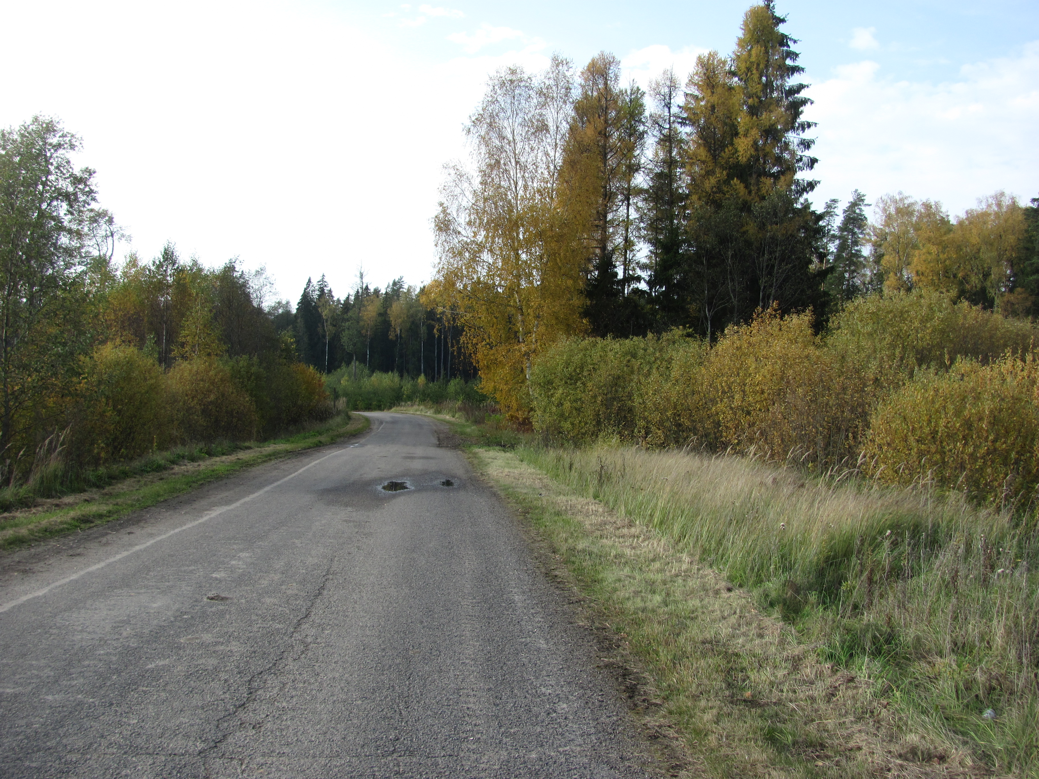 Rokiškio kaimiškoji sen., Lithuania